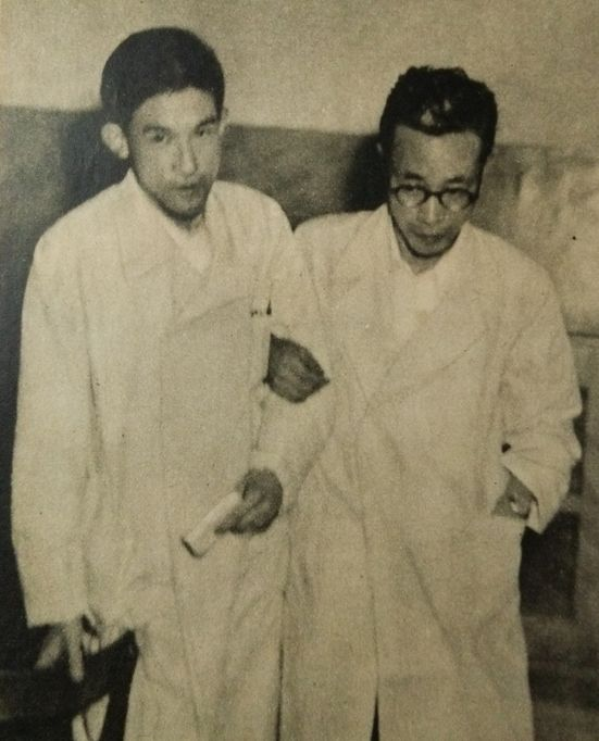 久保山の主治医である熊取敏之（左）と三好和夫（右）。久保山の死の直後。